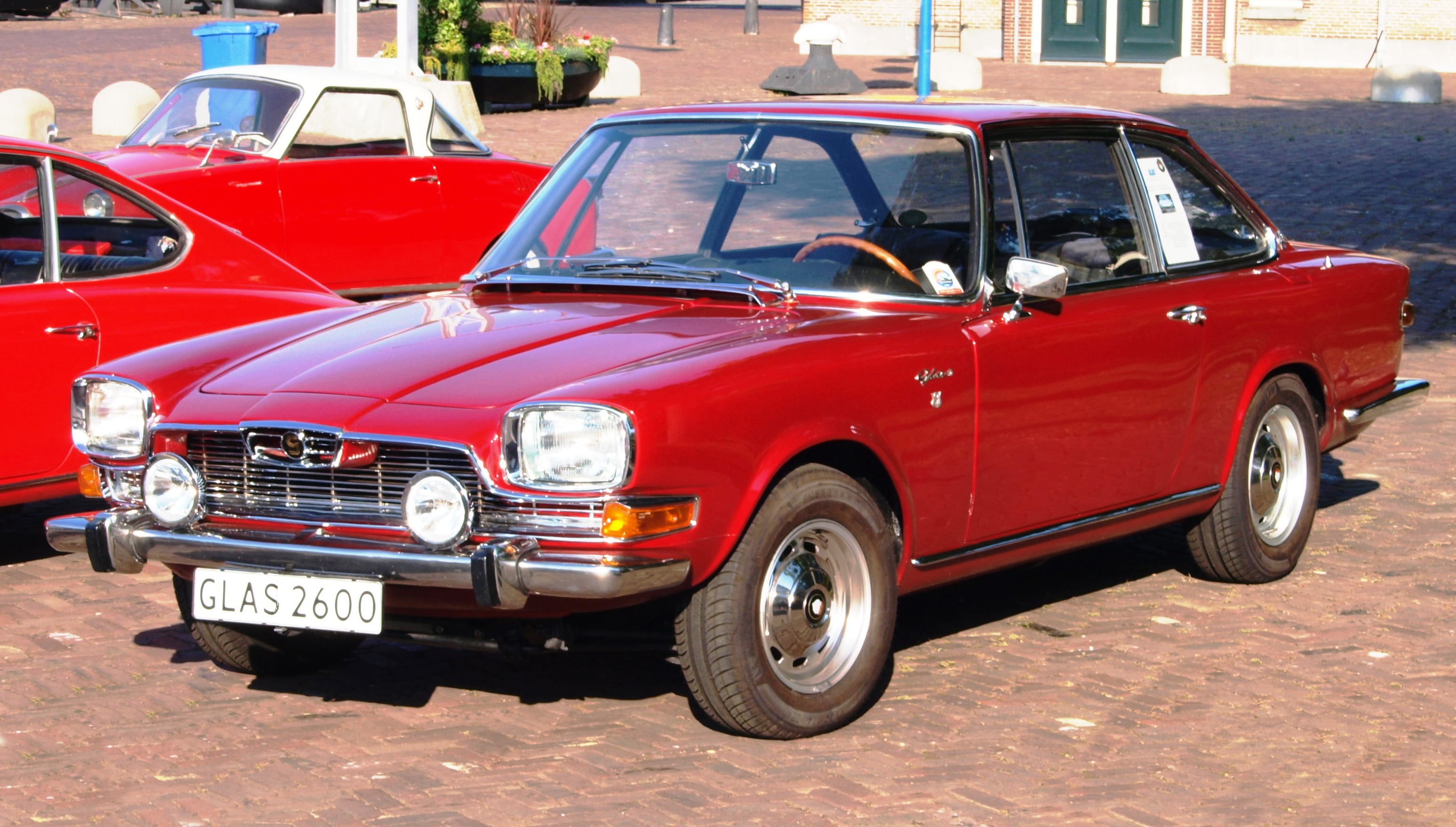 Glas V8 au Helder